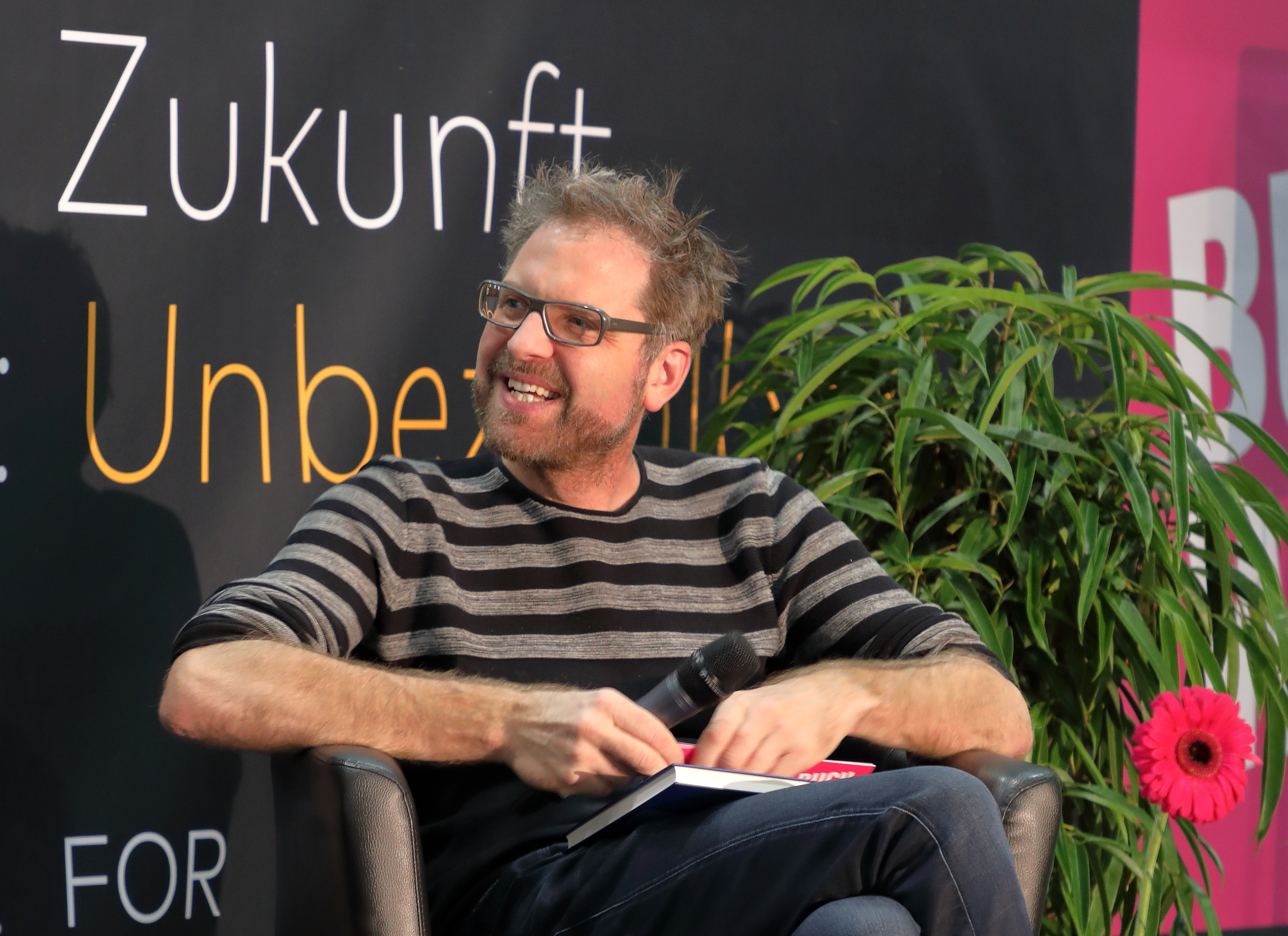 Der Journalist und Schriftsteller Wolfgang Popp als Moderator auf einer Bühne der Wiener Buchmesse 2017.